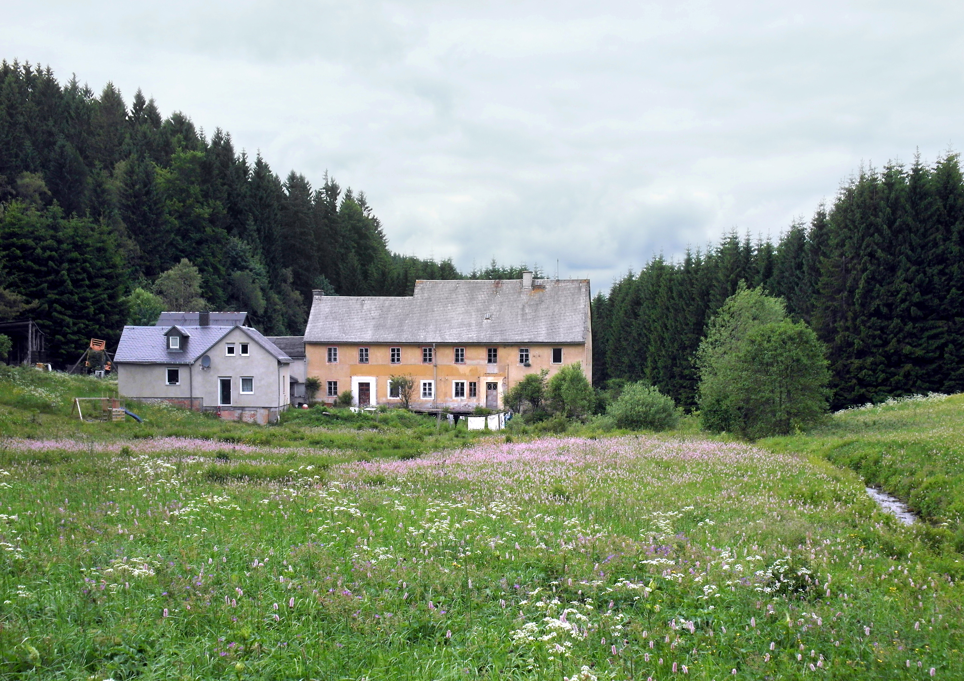 13.06.2017 01776 Hermsdorf/Erzgebirge, Gimmlitztalweg 5 (GMP: 50.757860,13.610884): Schmutzlermühle, als Sägemühle errichtet, ist sie seit dem 1. Weltkrieg artfremd genutzt worden. Sie diente als Wanderheim, Jugendherberge, Wohnung für die in Dresden ausgebombten Familien, für ehemalige Sudetendeutsche, die von den Tschechen ausgewiesen wurden und als ehemaliges Ferienheim der Stadt Freital für behinderte Kinder. Heute Privatbesitz, Nutzung für Wohnzwecke. Sicht von Südosten. [SAM0329.JPG]20170613520DR.JPG(c)Blobelt